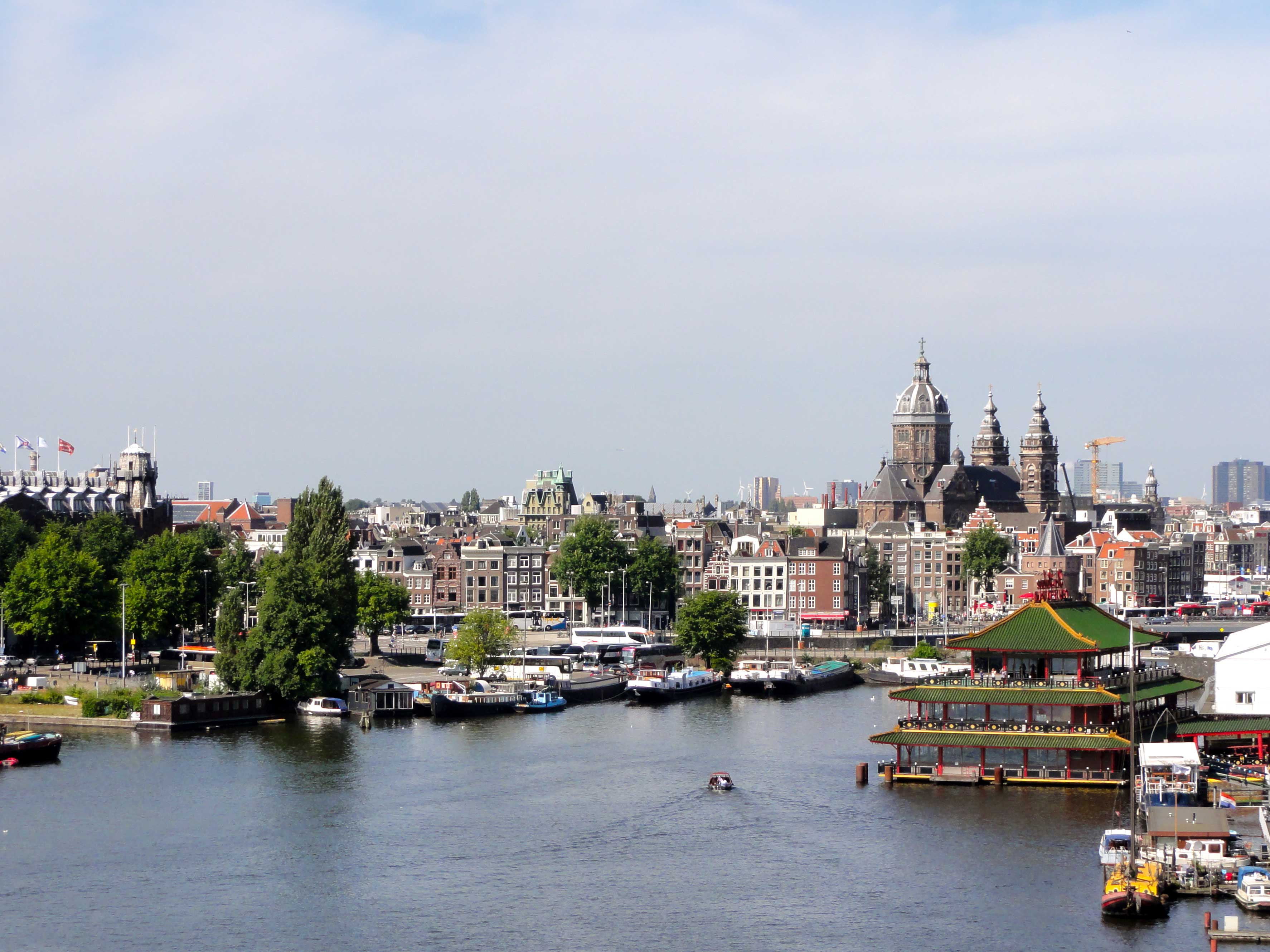 Zicht op het centrum van Amsterdam